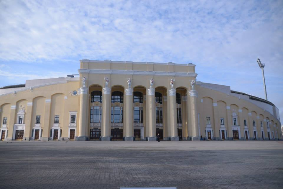 Стадион "Центральный". Комплекс (Свердловская область, Екатеринбург, улица Репина, 5)